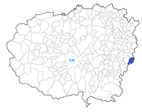 Posizione del comune nella provincia di Cuneo